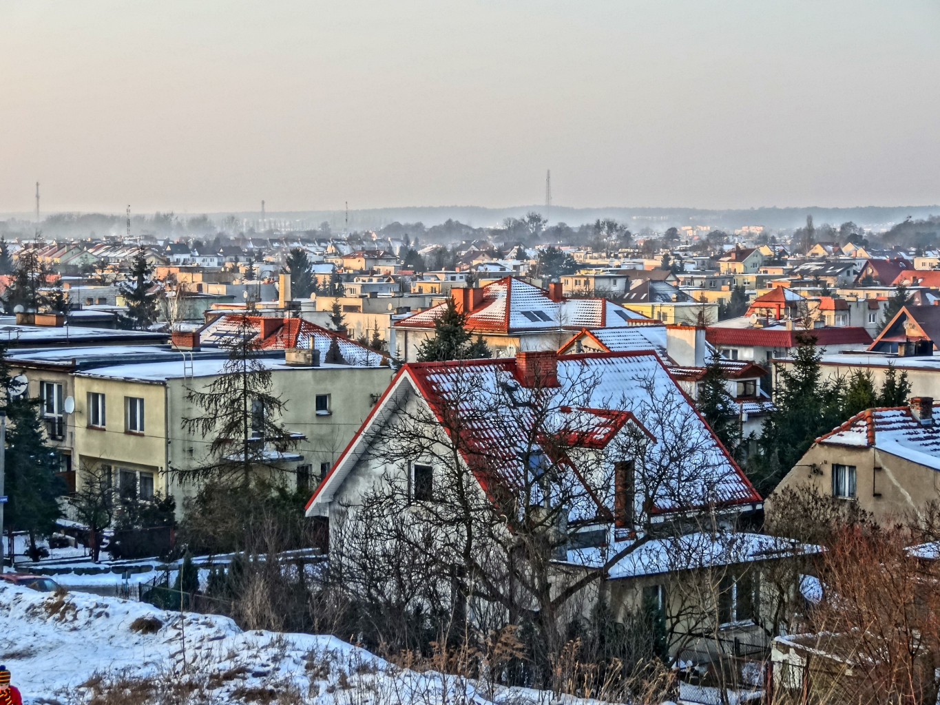 Osiedle Miedzyń w Bydgoszczy - widok ze Zbocza Bydgoskiego (Skarpy Południowej)